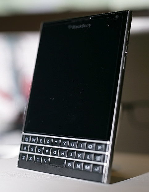 BB Q30